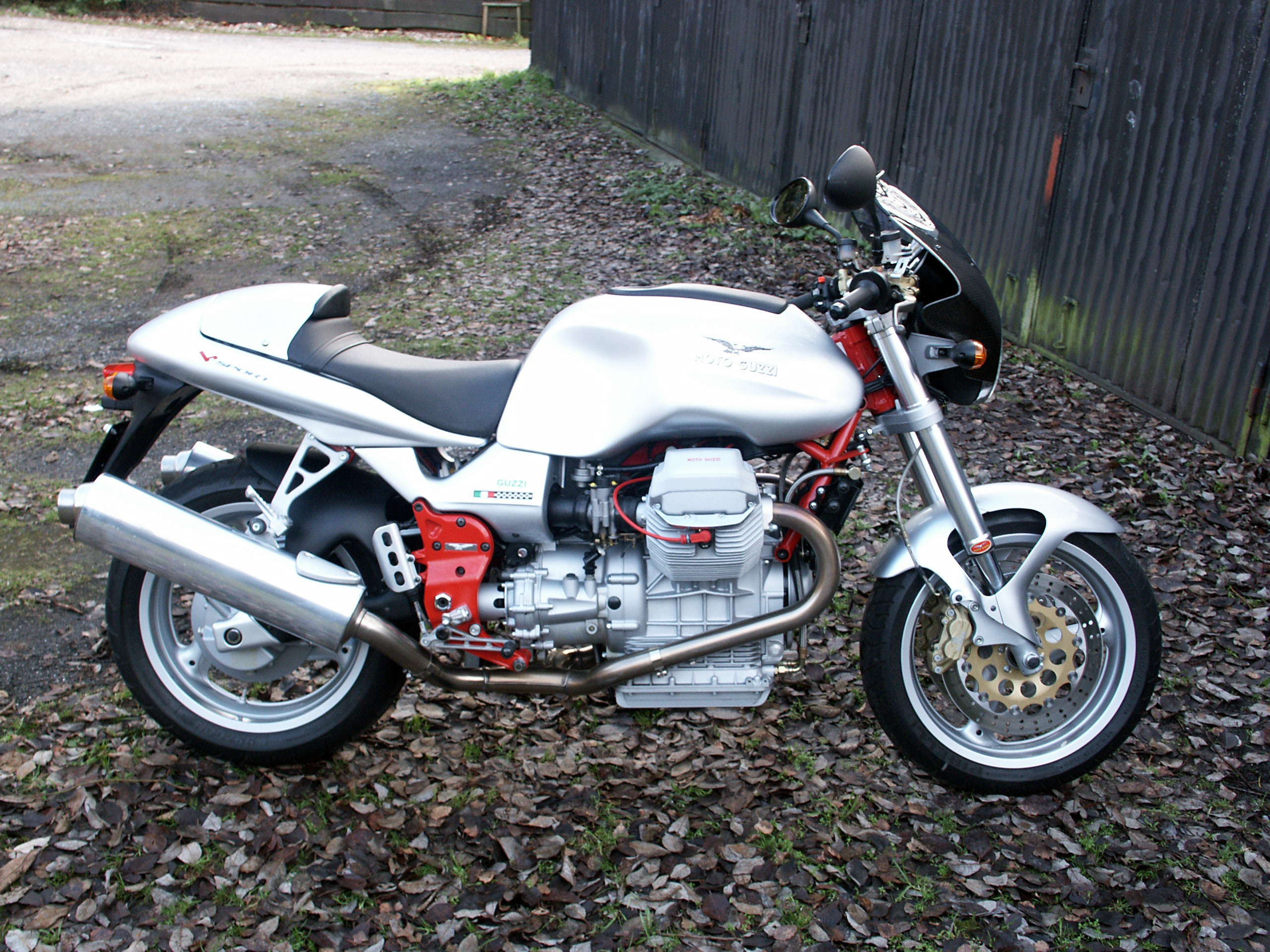 Moto Guzzi V11 Sprt